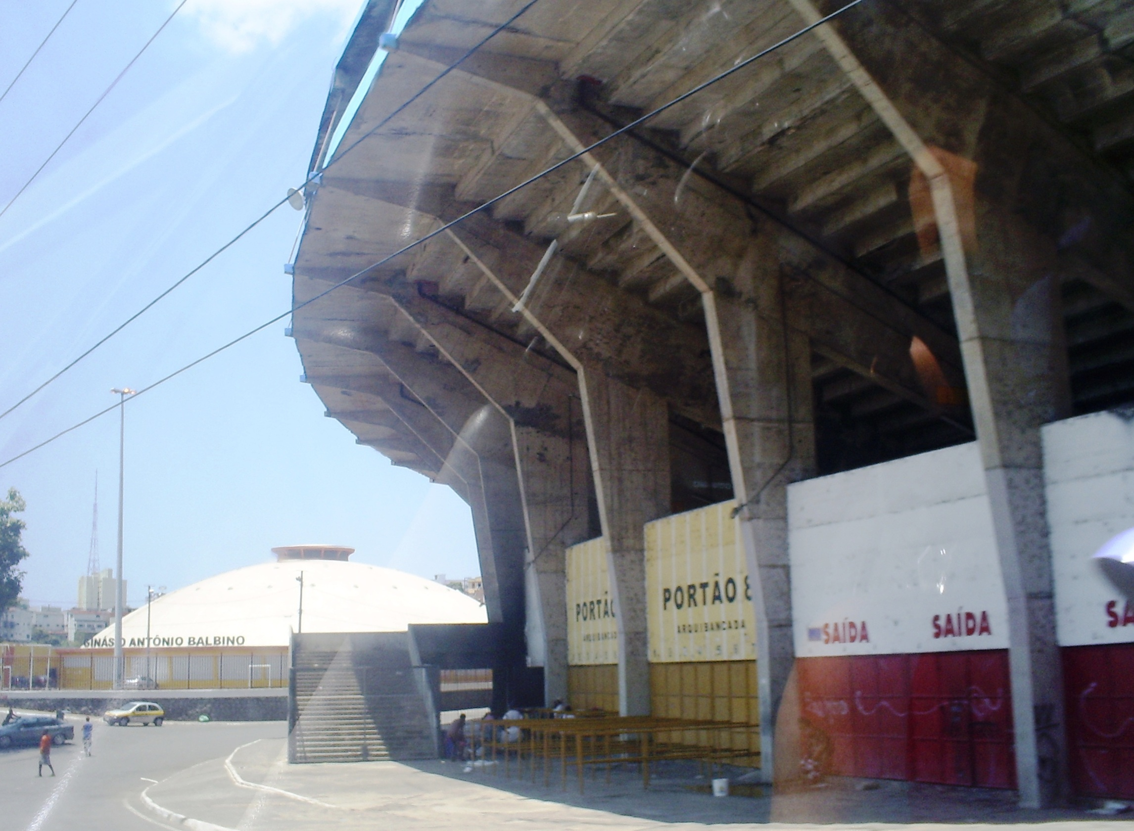 Foto da Fonte Nova e o Ginásio Antônio Balbino, Salvador, Bahia, Brasil.